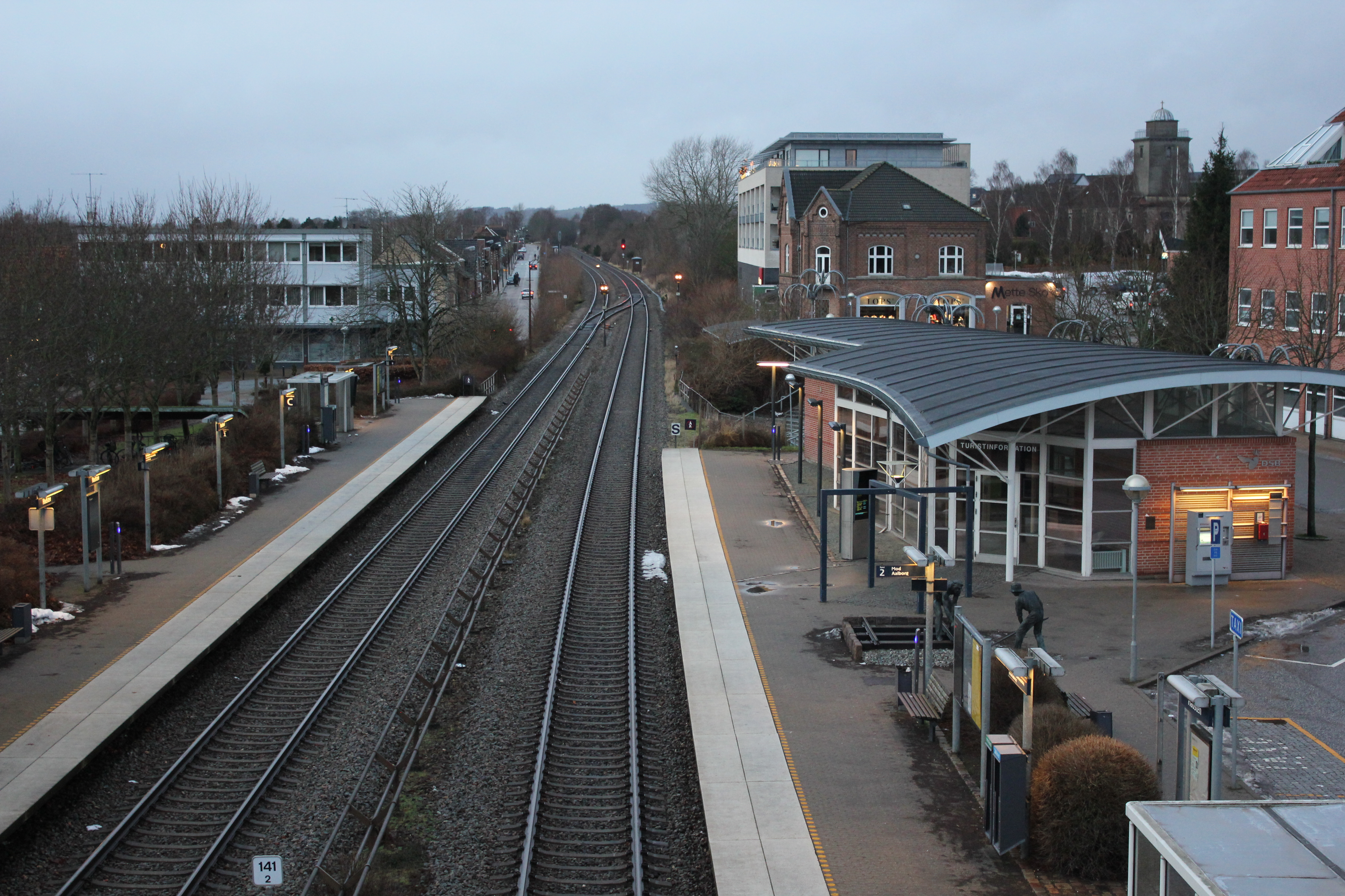 Hadsten Station fotograferet fra landevejsbroen 26. december 2012.